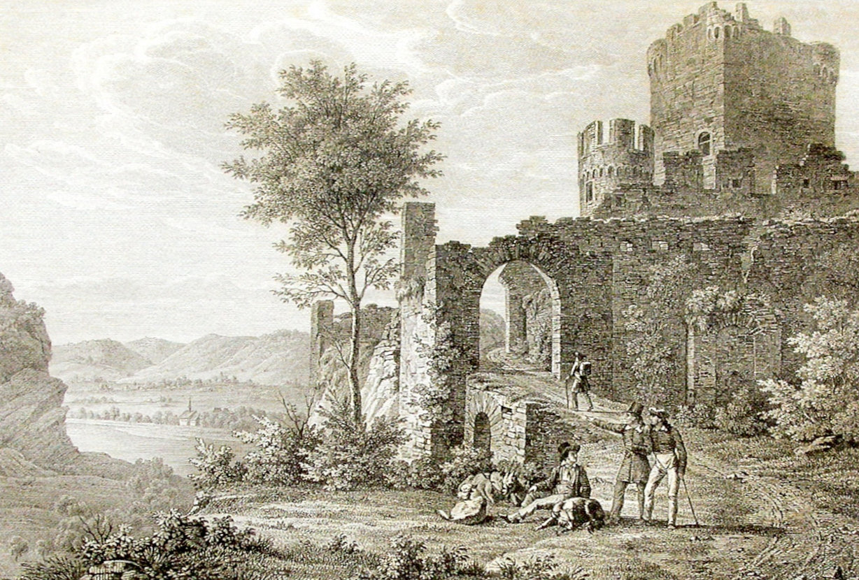 Burg Cochem, Ansicht Richtung Süden, mit Bergfried und sog. Hexenturm